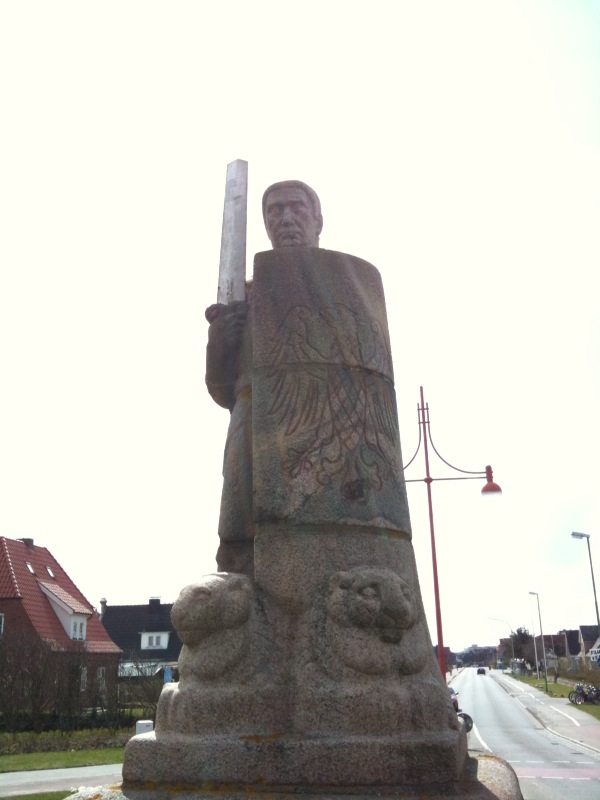 Foto des Rolandes auf Sylt